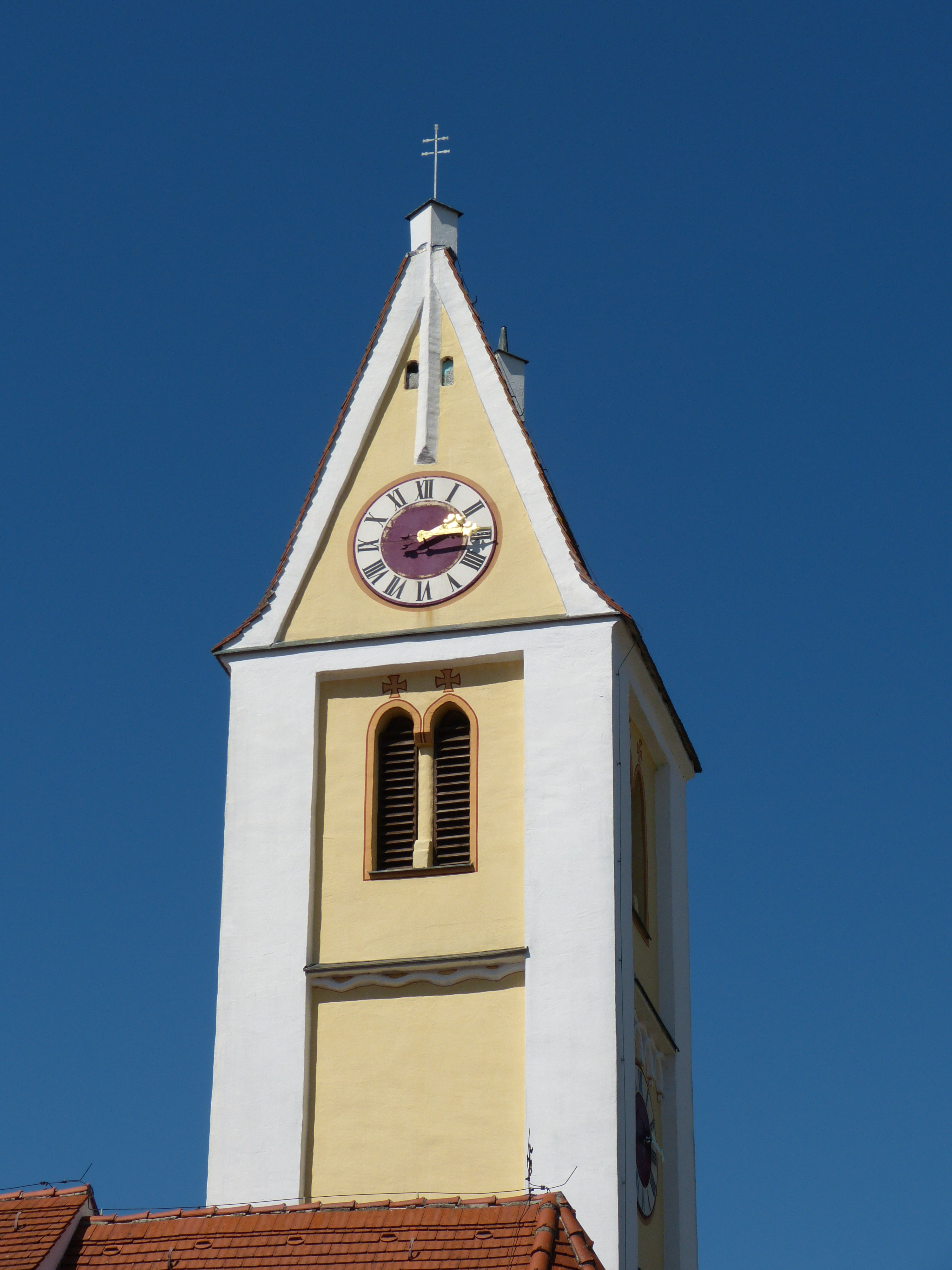 St. Sebastian in Stetten, Landkreis Unterallgäu, Bayern